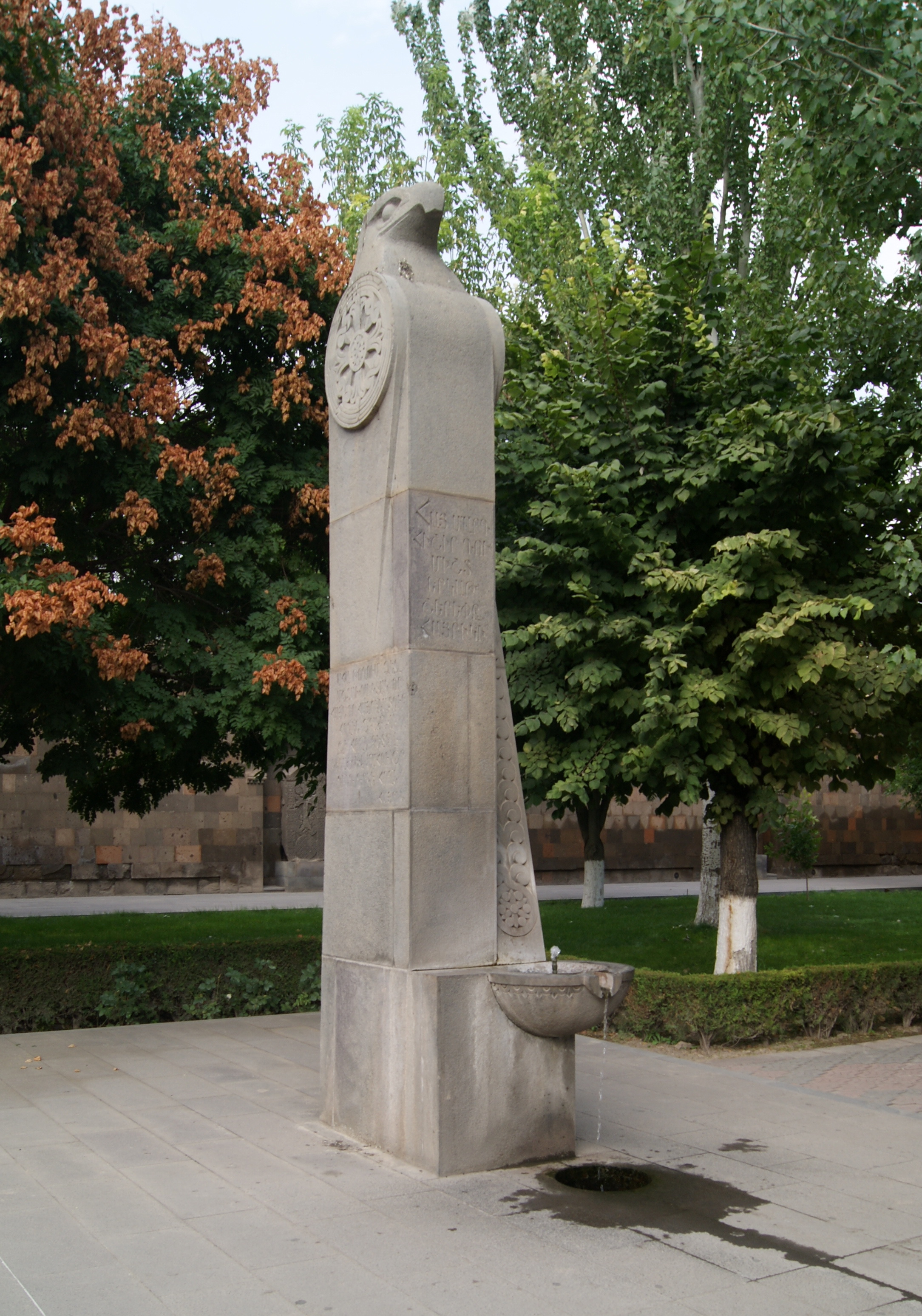 Խրիմյան Հայրիկին նվիրված հուշաղբյուր (Վաղարշապատ) 2/14.1.38